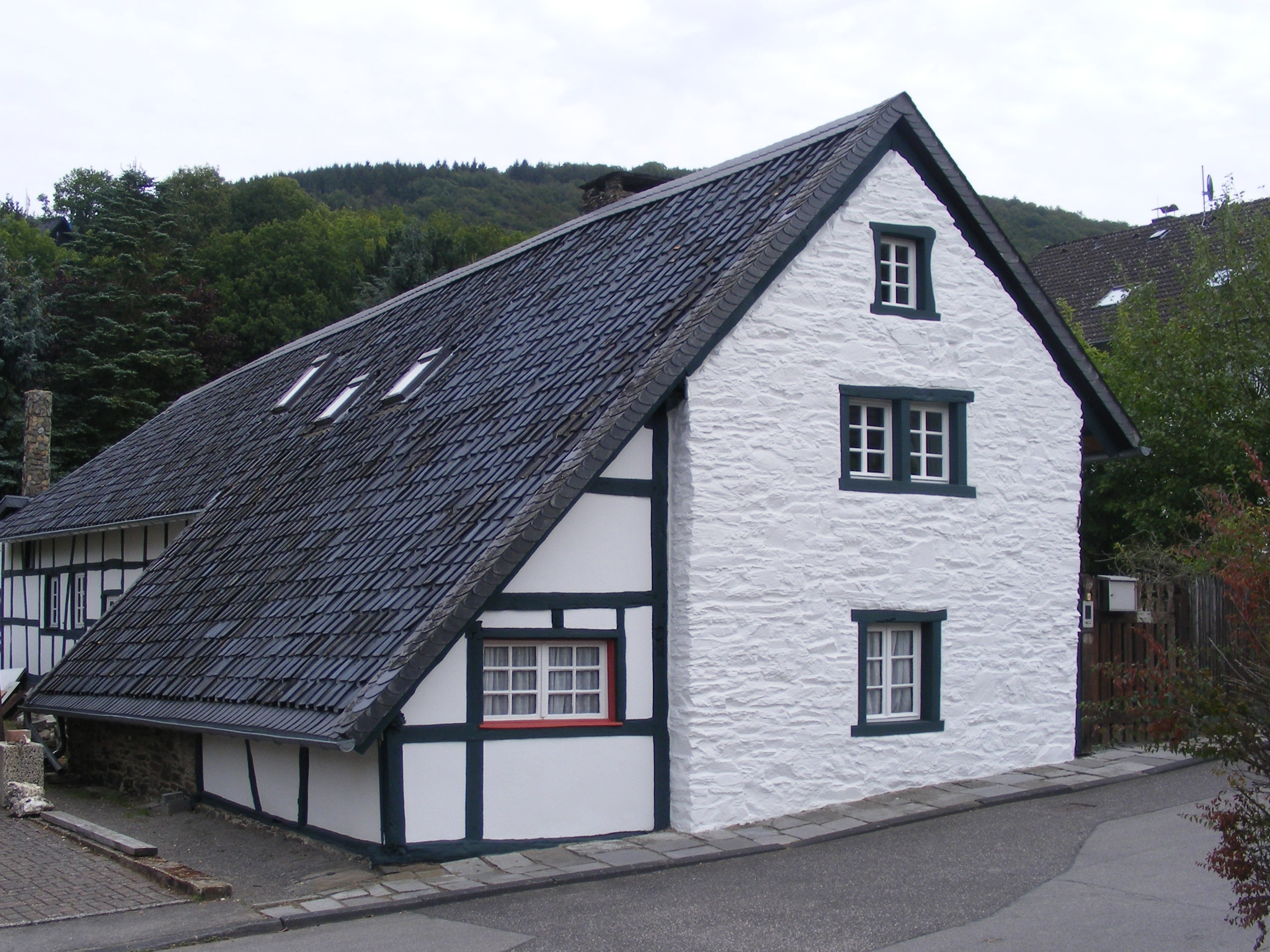 Simmerath Einruhr Römerstr 3This is a photograph of an architectural monument., no. 3